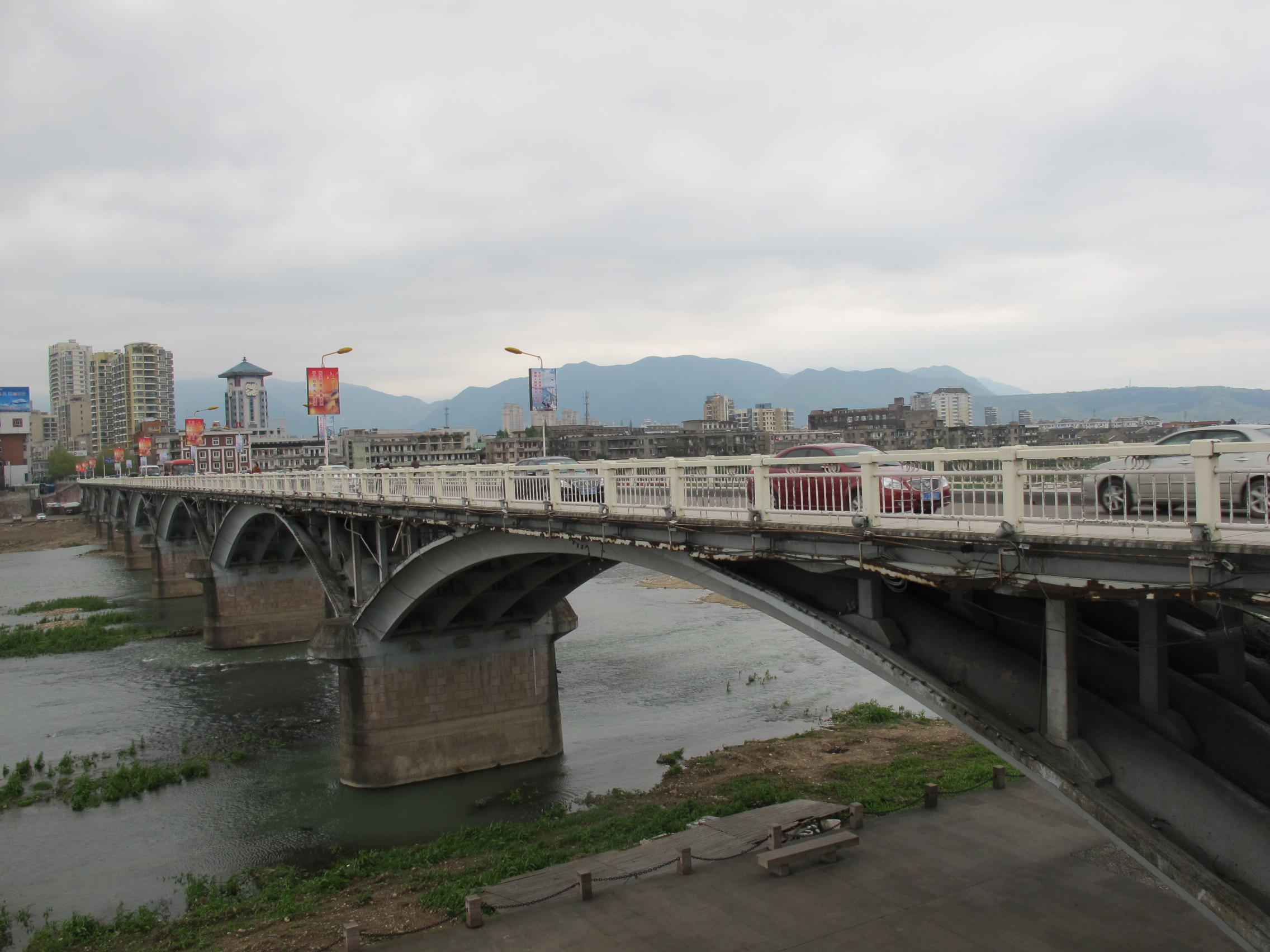 天台南门大桥